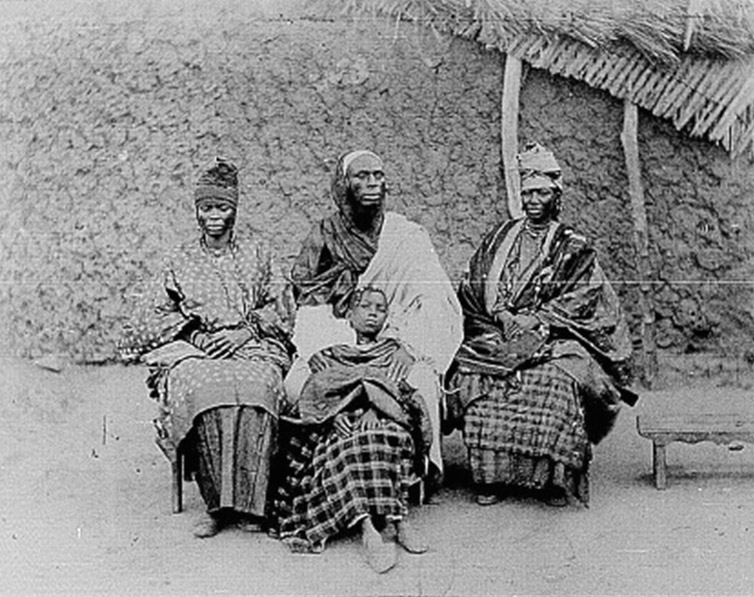 Alpha Sega, interprète toucouleur et ses soeurs (photo de la Mission Borgnis-Desbordes en 1882 au Soudan).